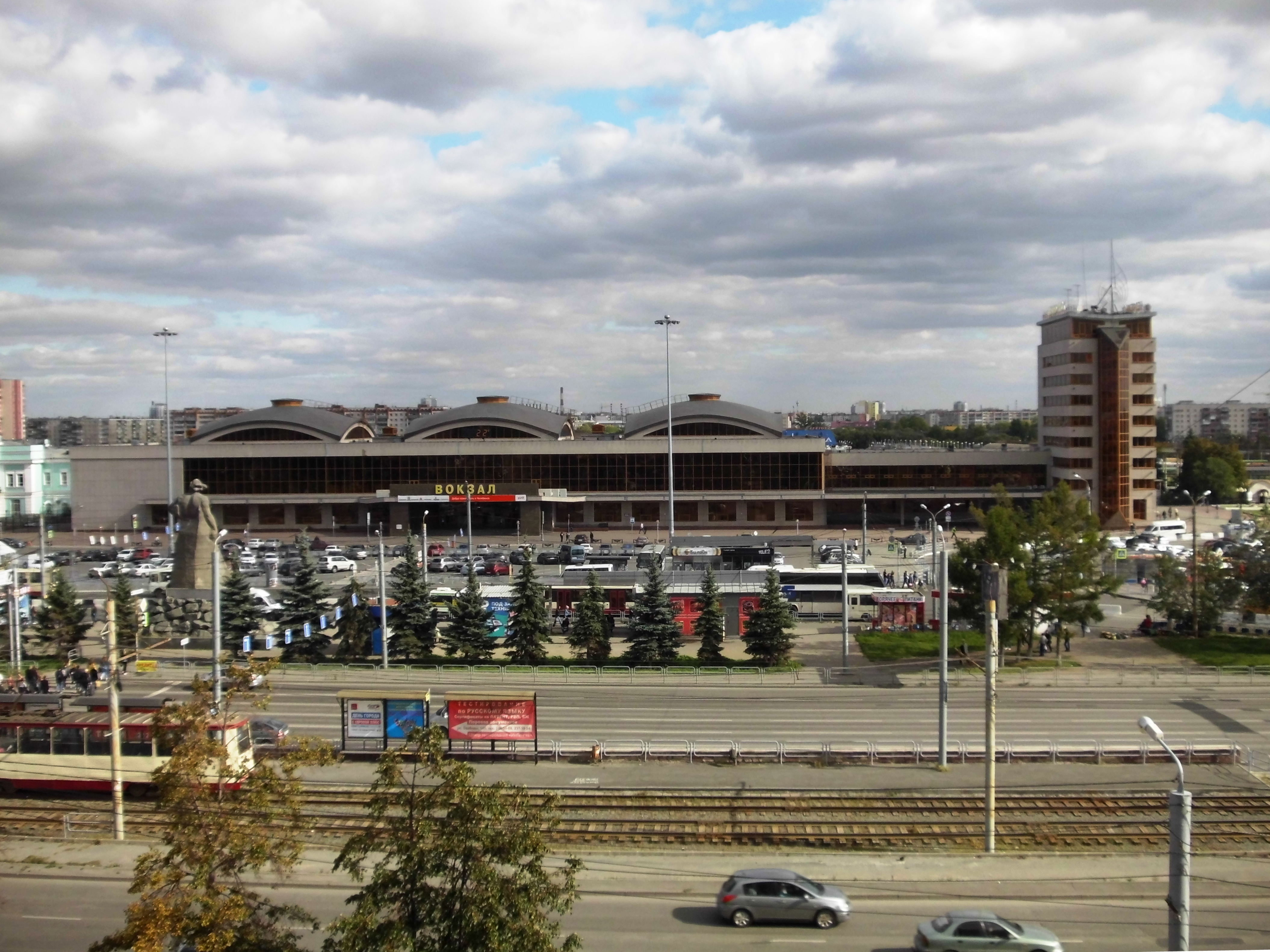 Здание железнодорожного вокзала: площадь Привокзальная, 1, Челябинск, Челябинская область. Гостиница вокзала (в правой части здания), привокзальная площадь, проезжая часть улицы Степана Разина. На дальнем плане - Ленинский район города.